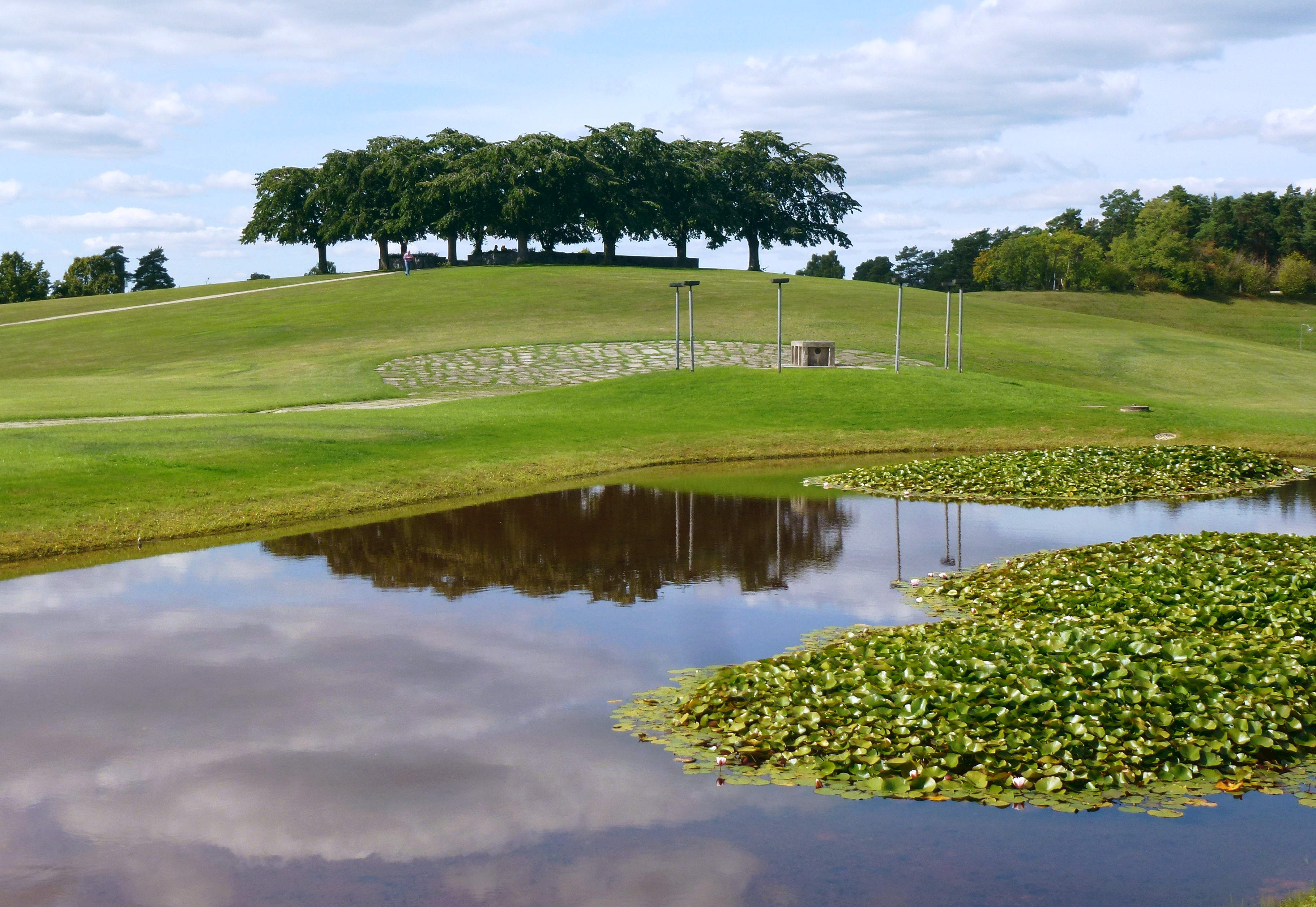 Skogskyrkogården lunden